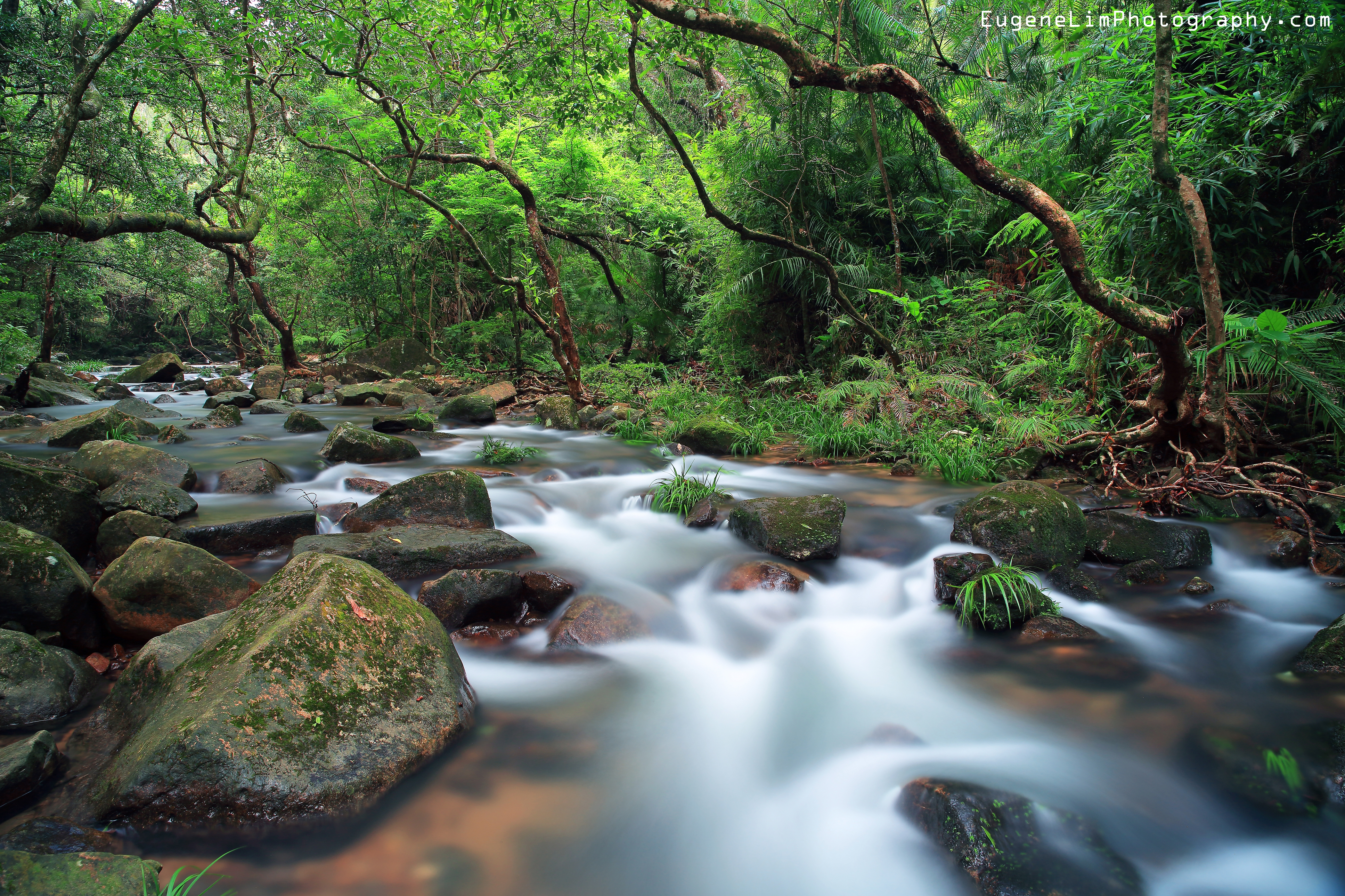 Tai Po, Hong Kong